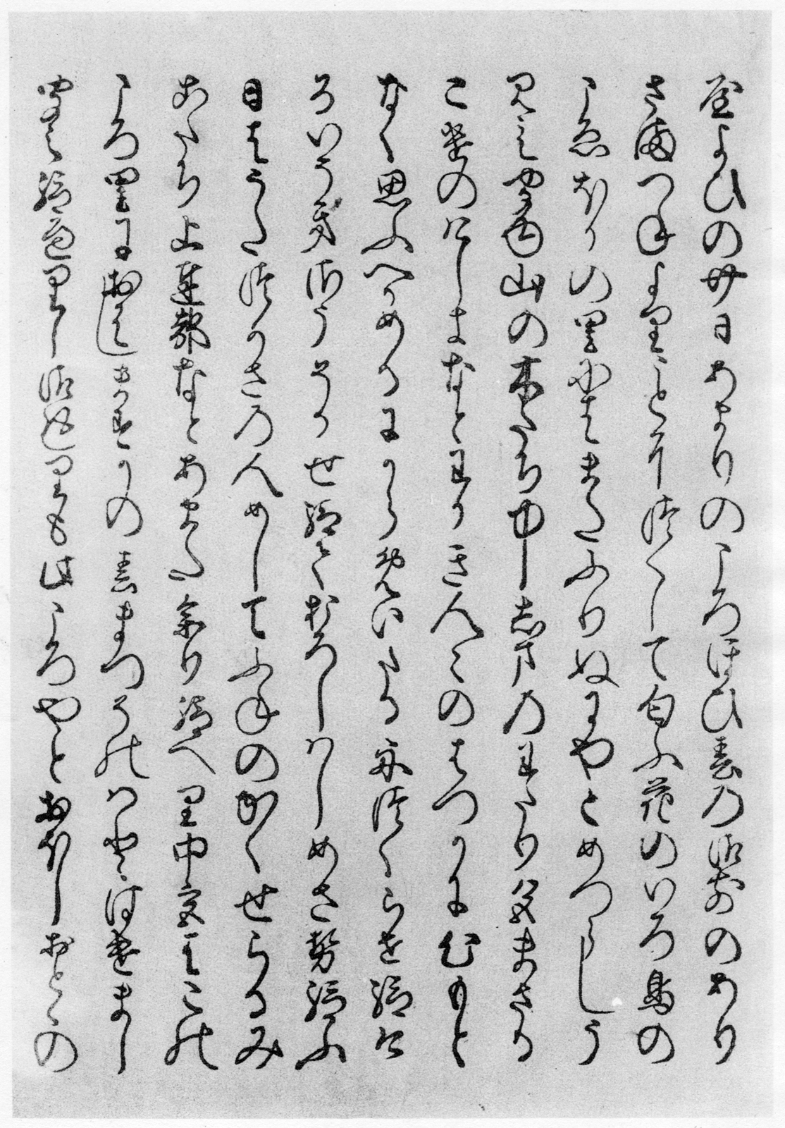 寛永木活本胡蝶巻写真。『定本源氏物語新解』中巻口絵より。